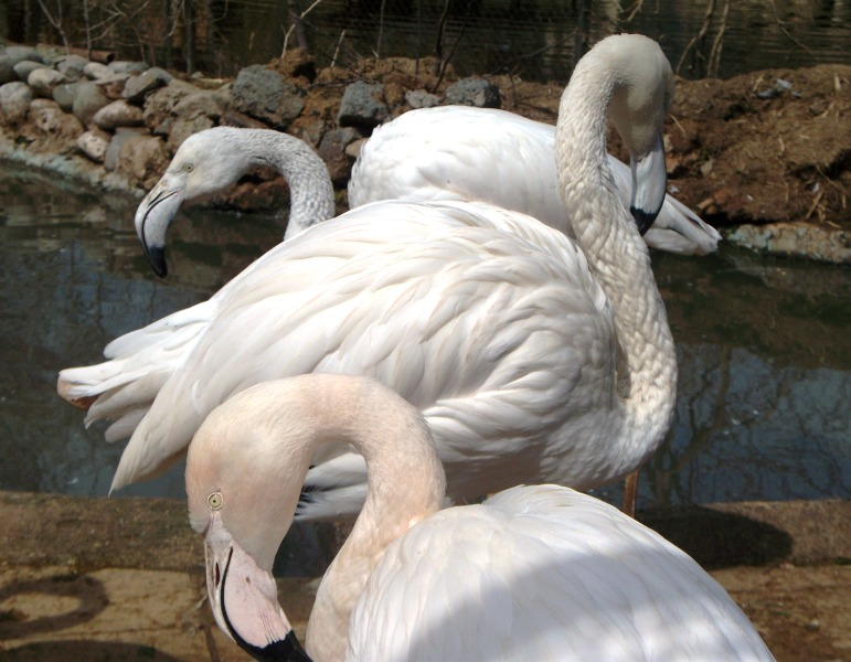 розовый фламинго в бакинском зоопарке